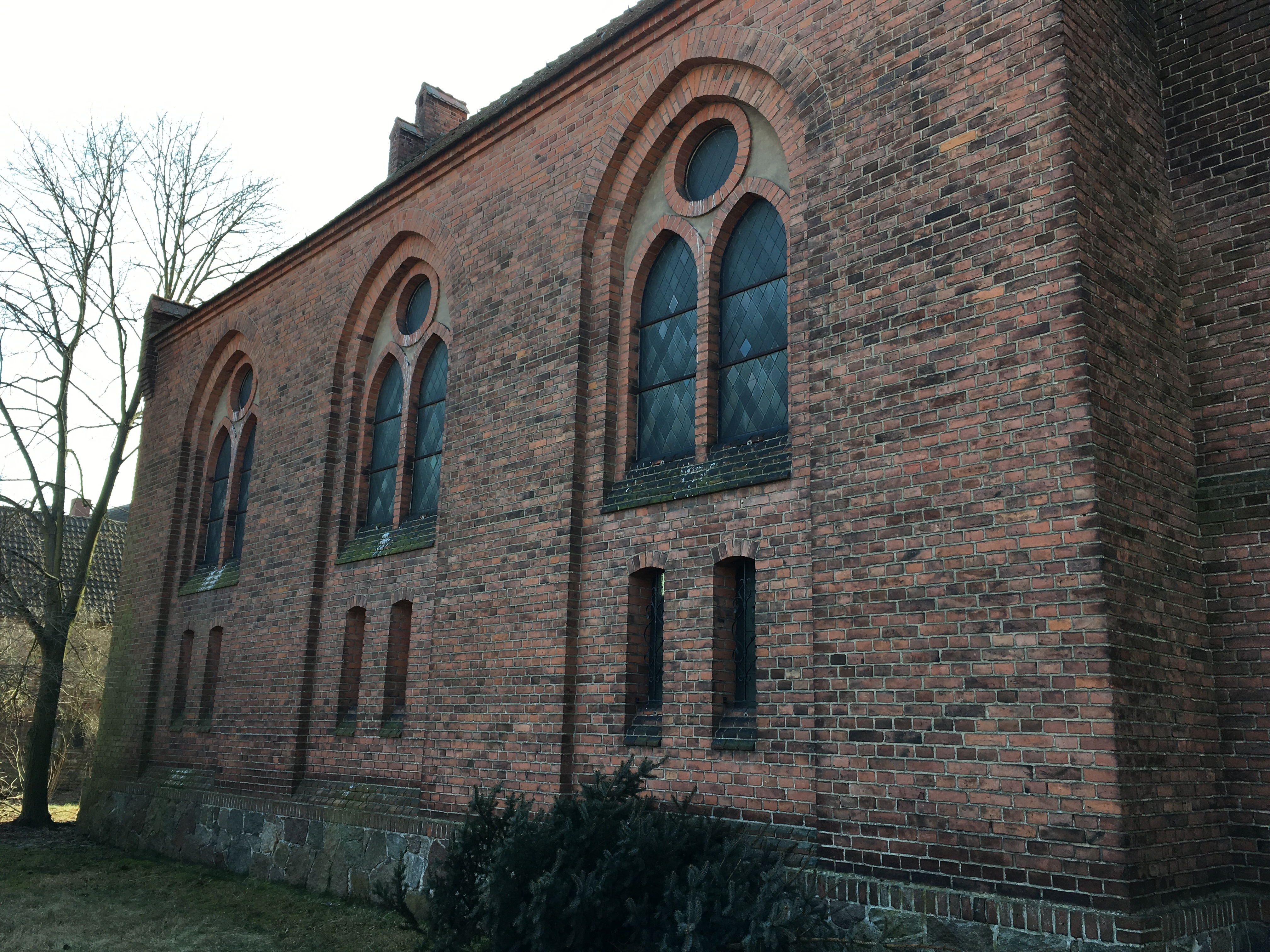 Die neugotische Dorfkirche in Niebel (Stadt Treuenbrietzen) entstand im Jahr 1895. Im Innern befindet sich unter anderem ein gotischer Schnitzaltar aus dem Ende des 15. Jahrhunderts. Er zeigt eine Vespergruppe.